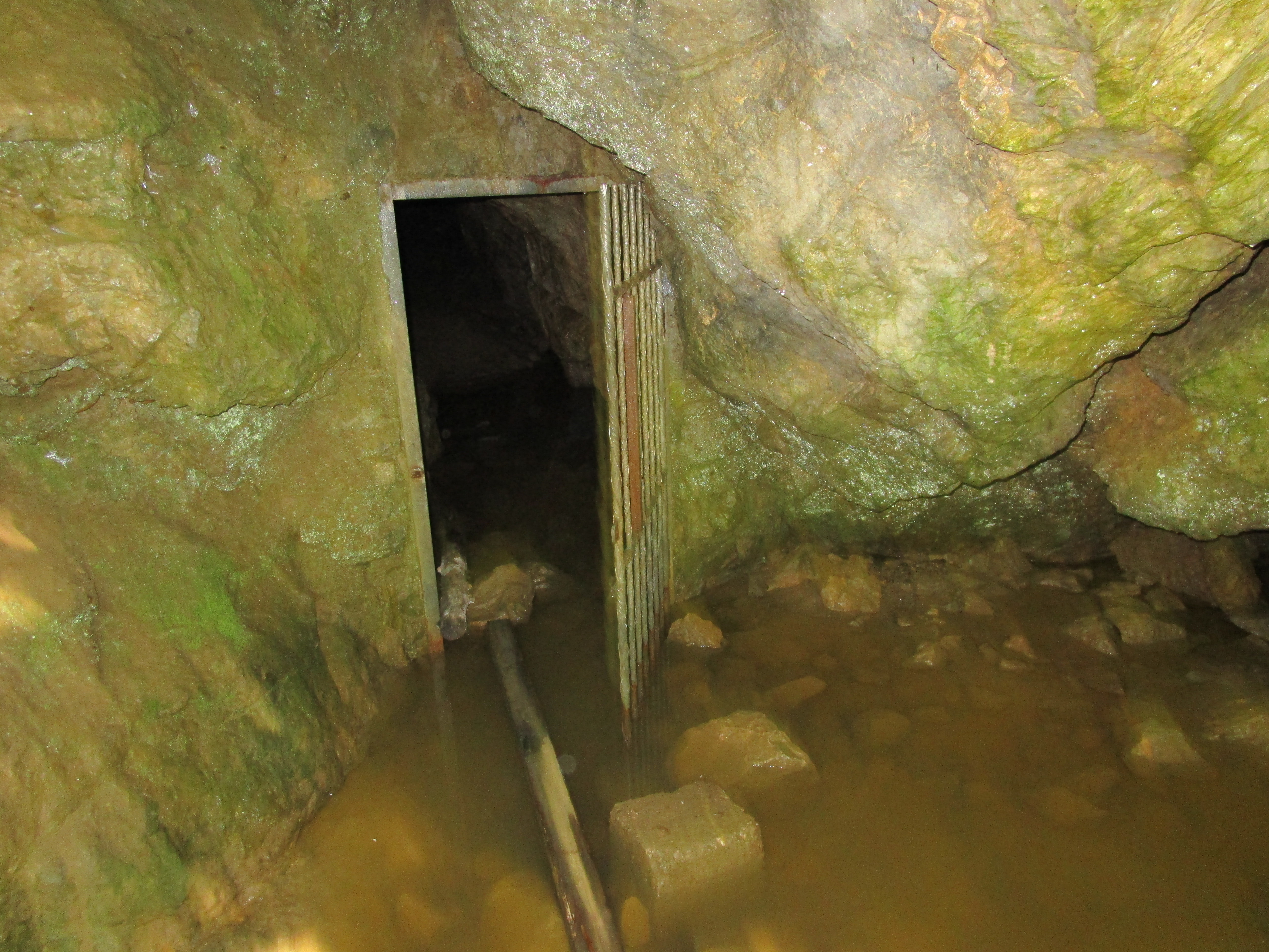 Eingang der Eisbründlhöhle nach einem Niederschlagsereignis